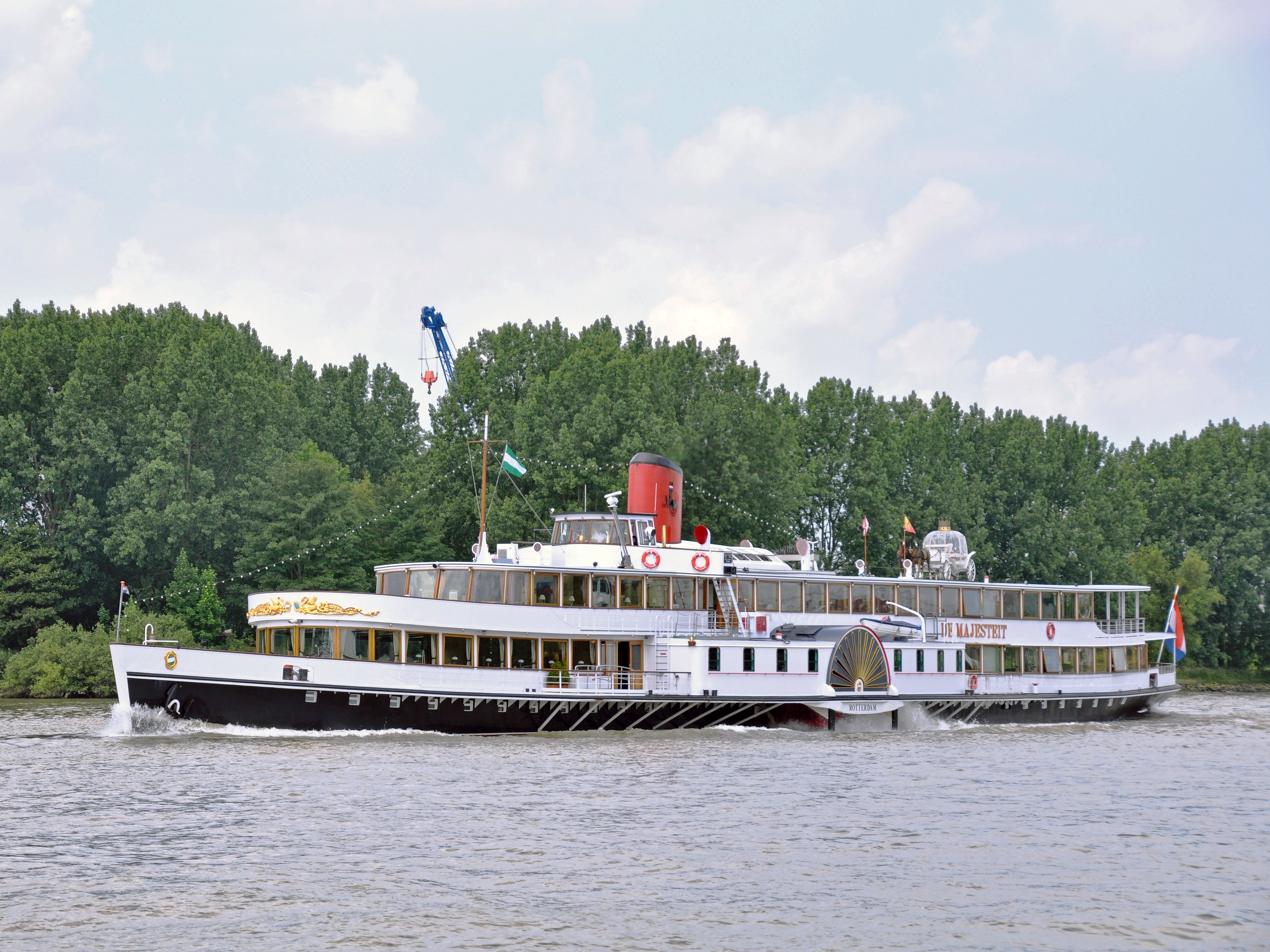 Salonstoomraderboot De Majesteit onderweg in de opvaart in de rivier de Noord.